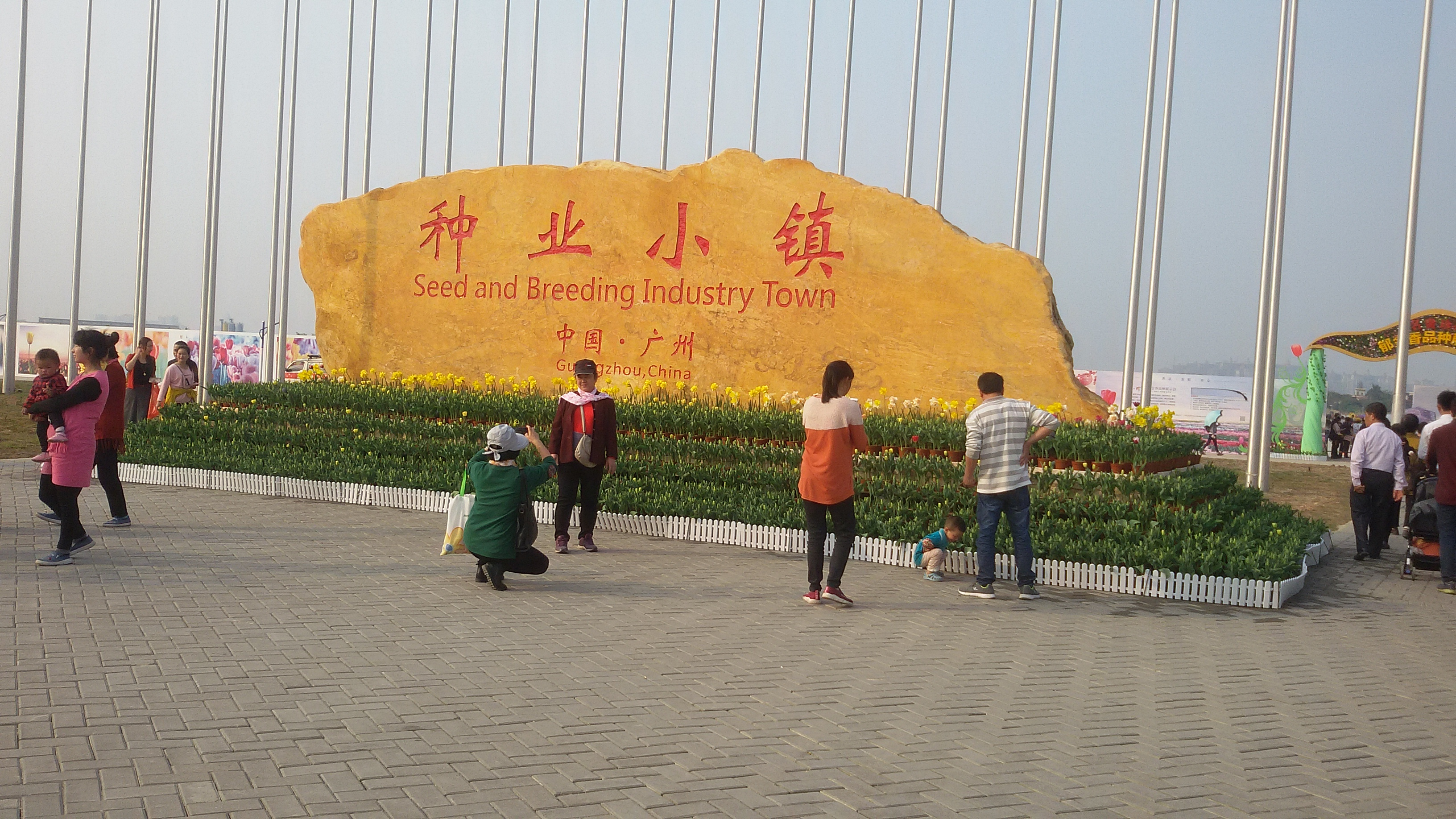 粵語: 廣州種業小鎮